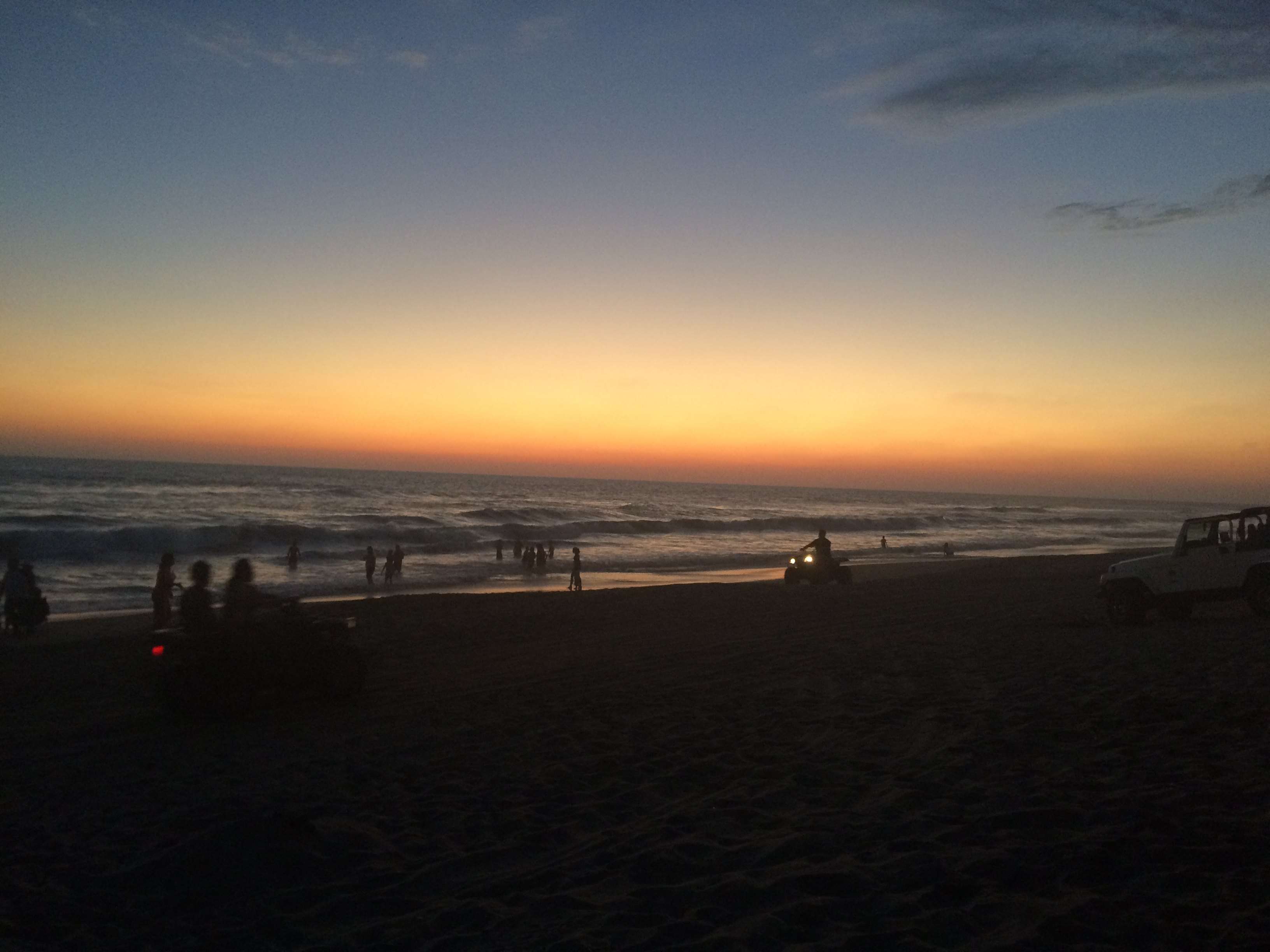 fotografía del atardecer en Barra Vieja